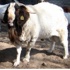 Chivo semental raza Boer